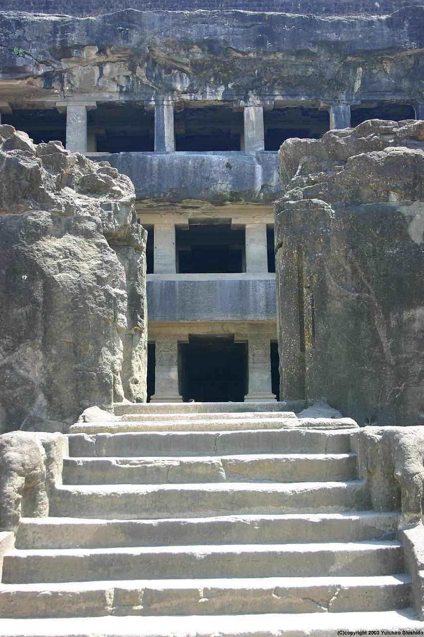 Ellora caves. Cave 12.